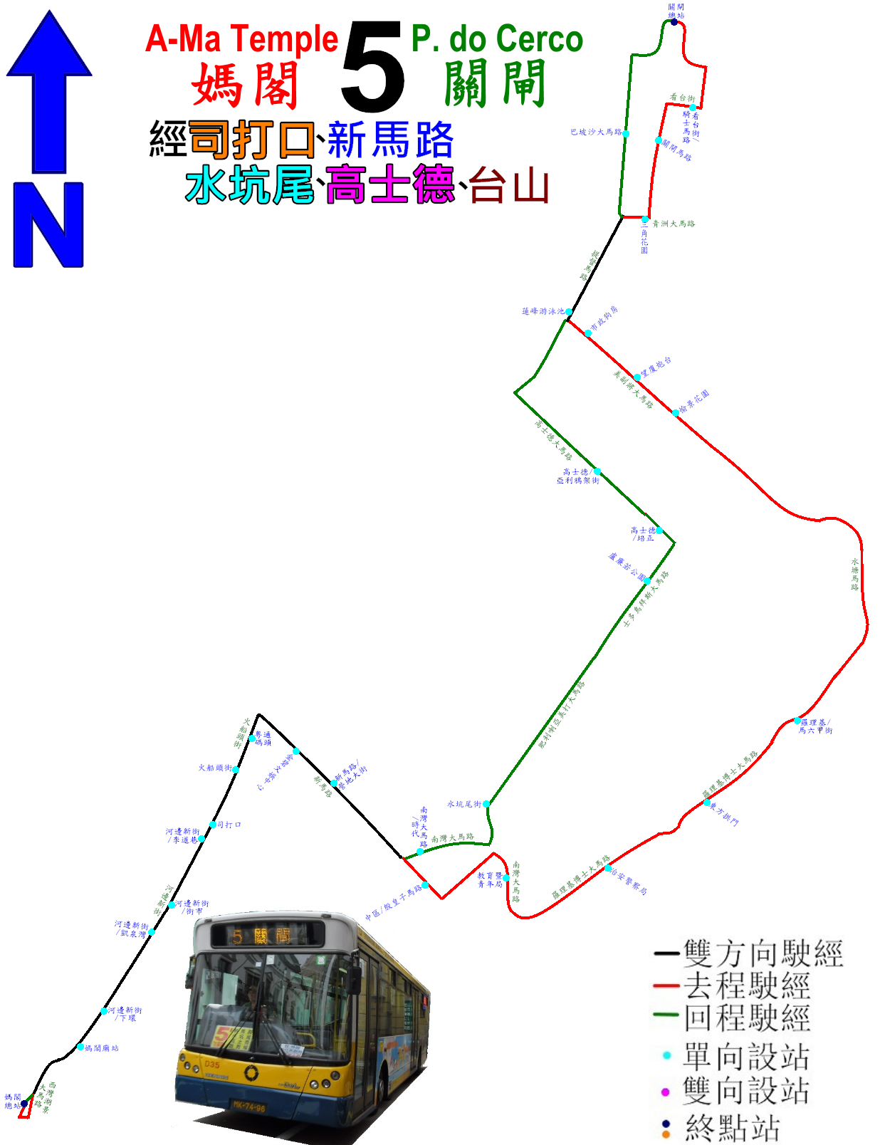 中文（香港）: 澳門巴士5路公車的走線圖